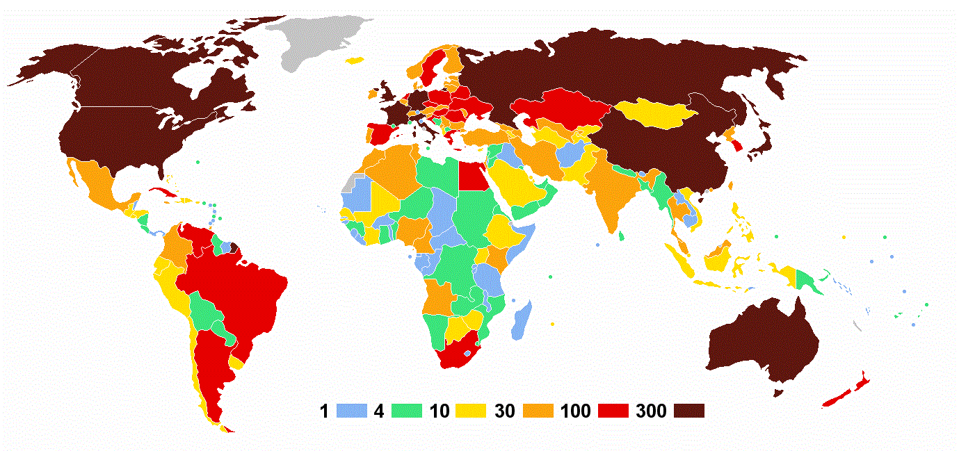 Anzahl der Athleten.